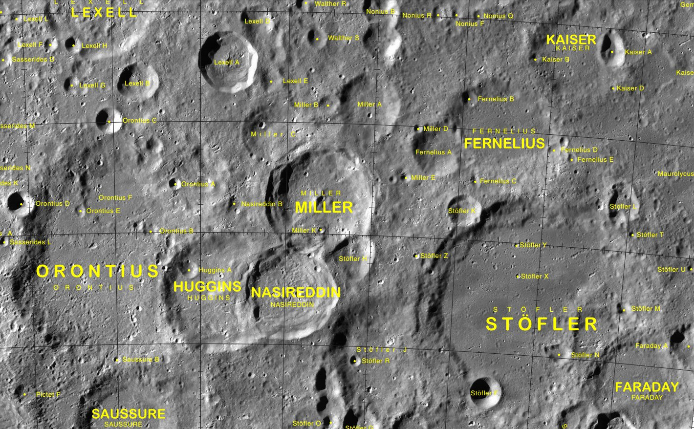 Cráter lunar Fernelius. Localización. (Imagen LROC)